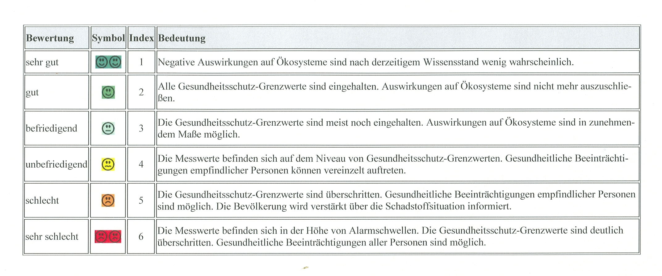 Luftqualität nach dem Wiener Luftindex